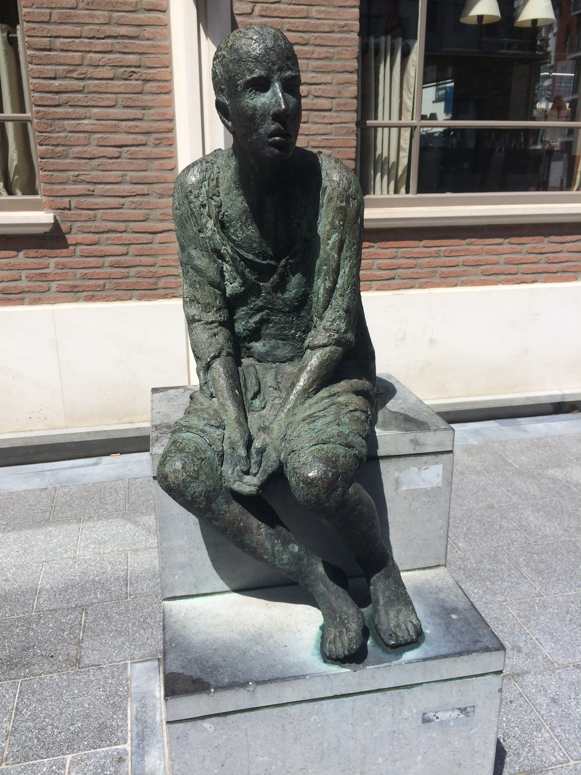 Beeldje van Hanneke Beaumont